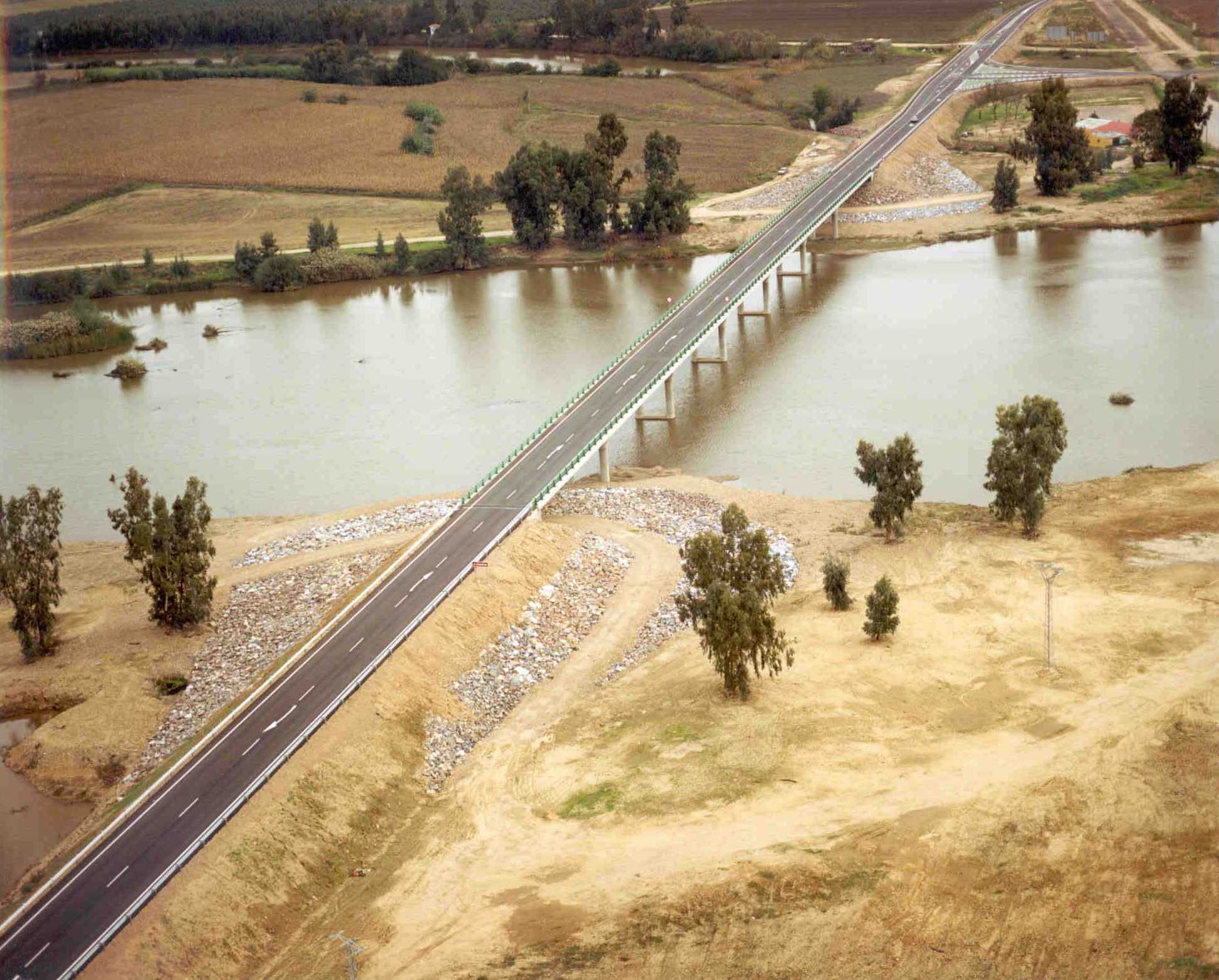 Carretera EX-307. Puente sobre el río Guadiana.